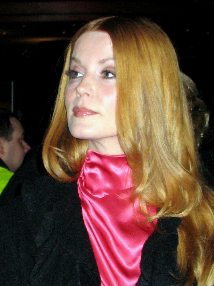 Esther Schweins bei der Eröffnung der Berlinale 2009, 2009-02-05